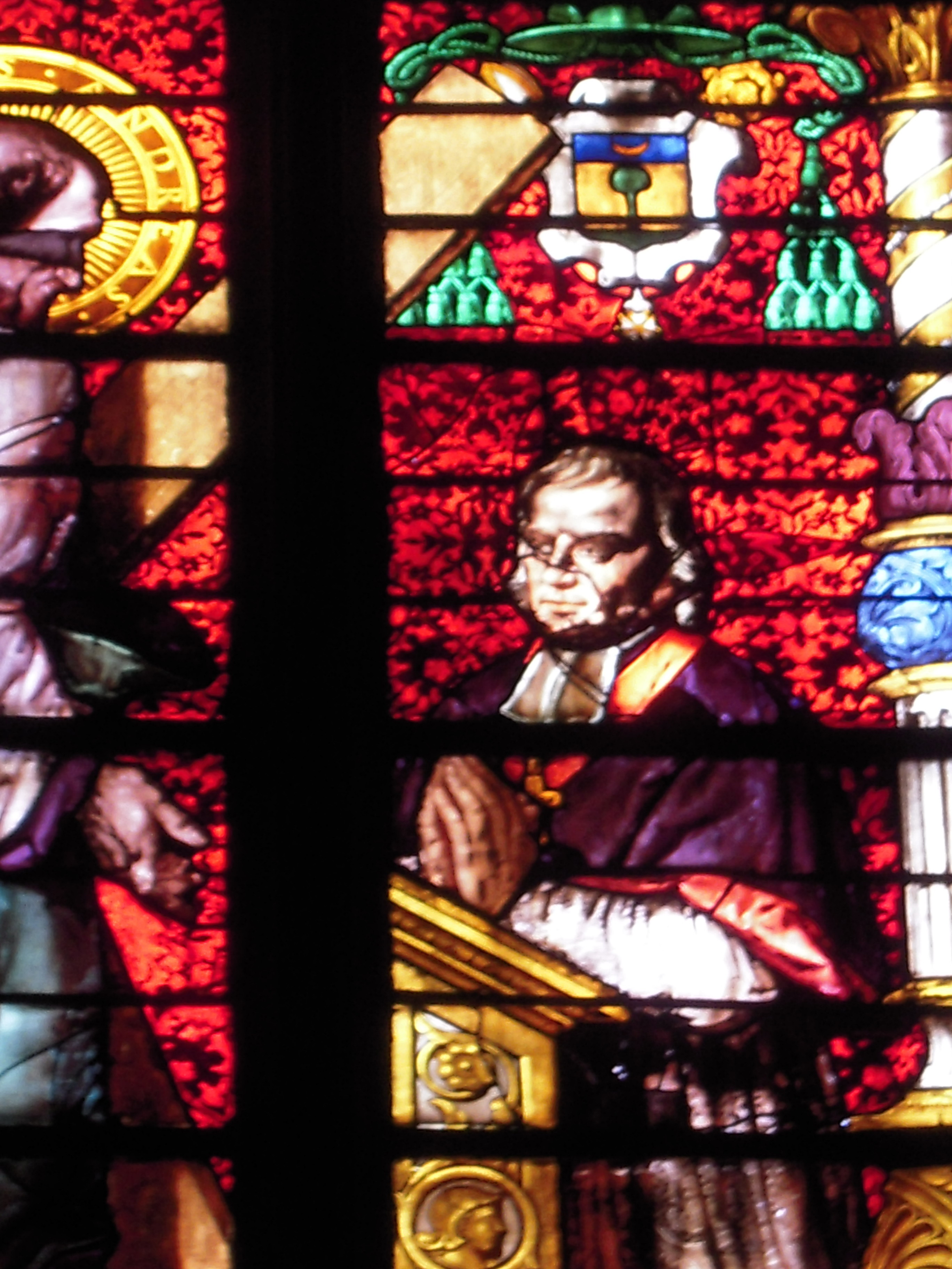 Détail d'un vitrail de la cathédrale de Metz représentant Mgr André Jauffret, évêque de Metz de 1807 à 1823.